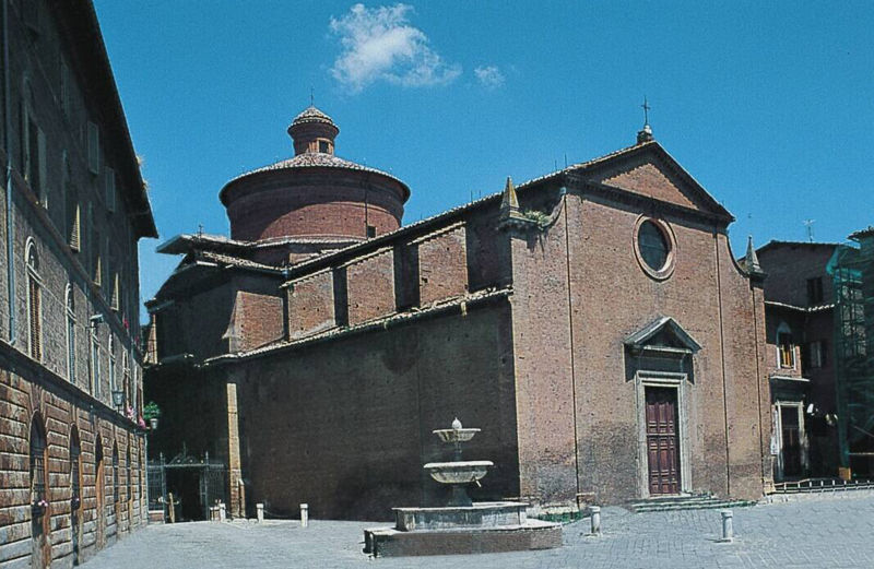 Vue de l'église Santo Spirito de Sienne (Italie)